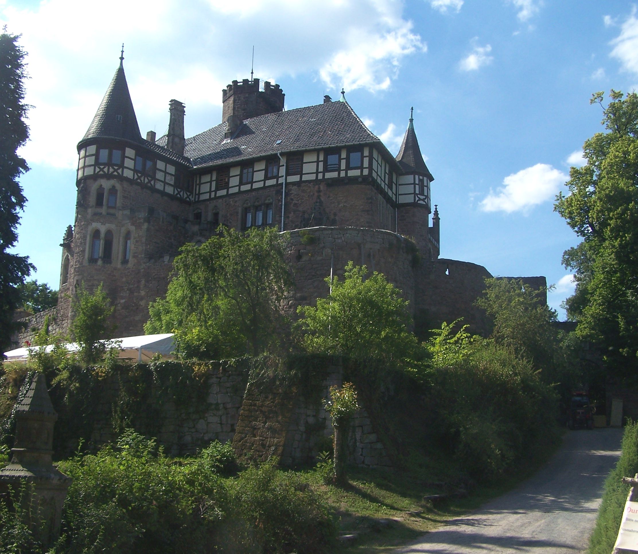 Schloss Berlepsch bei Witzenhausen (Hessen)